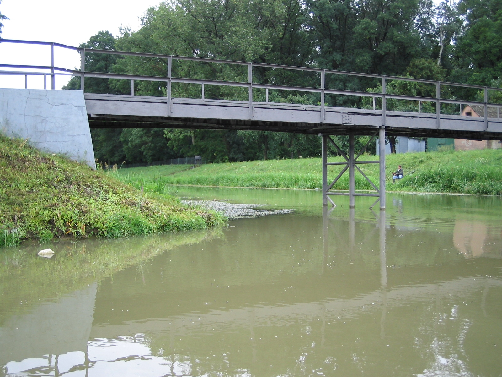 Křižovatka řeky Veličky a Baťova kanálu u Strážnice, vlastní